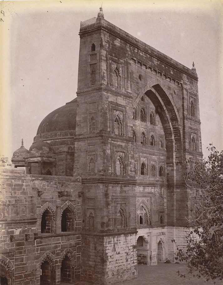 Jama Masjid at Jaunpur (Uttar Pradesh, India)